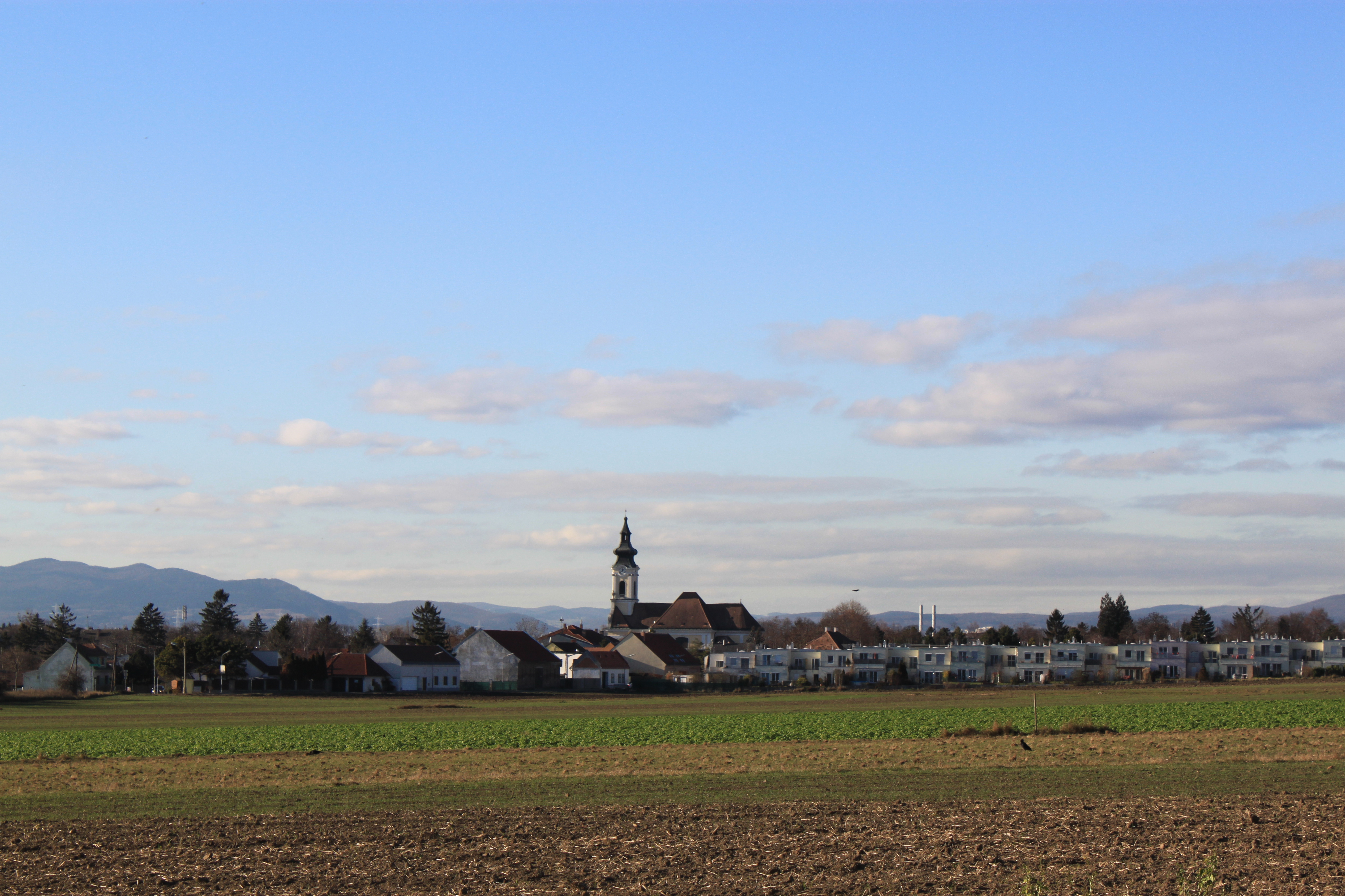 Oberlaa vom Hang des Goldbergs betrachtet